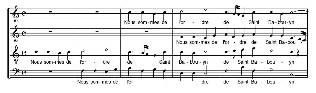 extrait de Nous sommes de l'ordre… de Loyset Compère